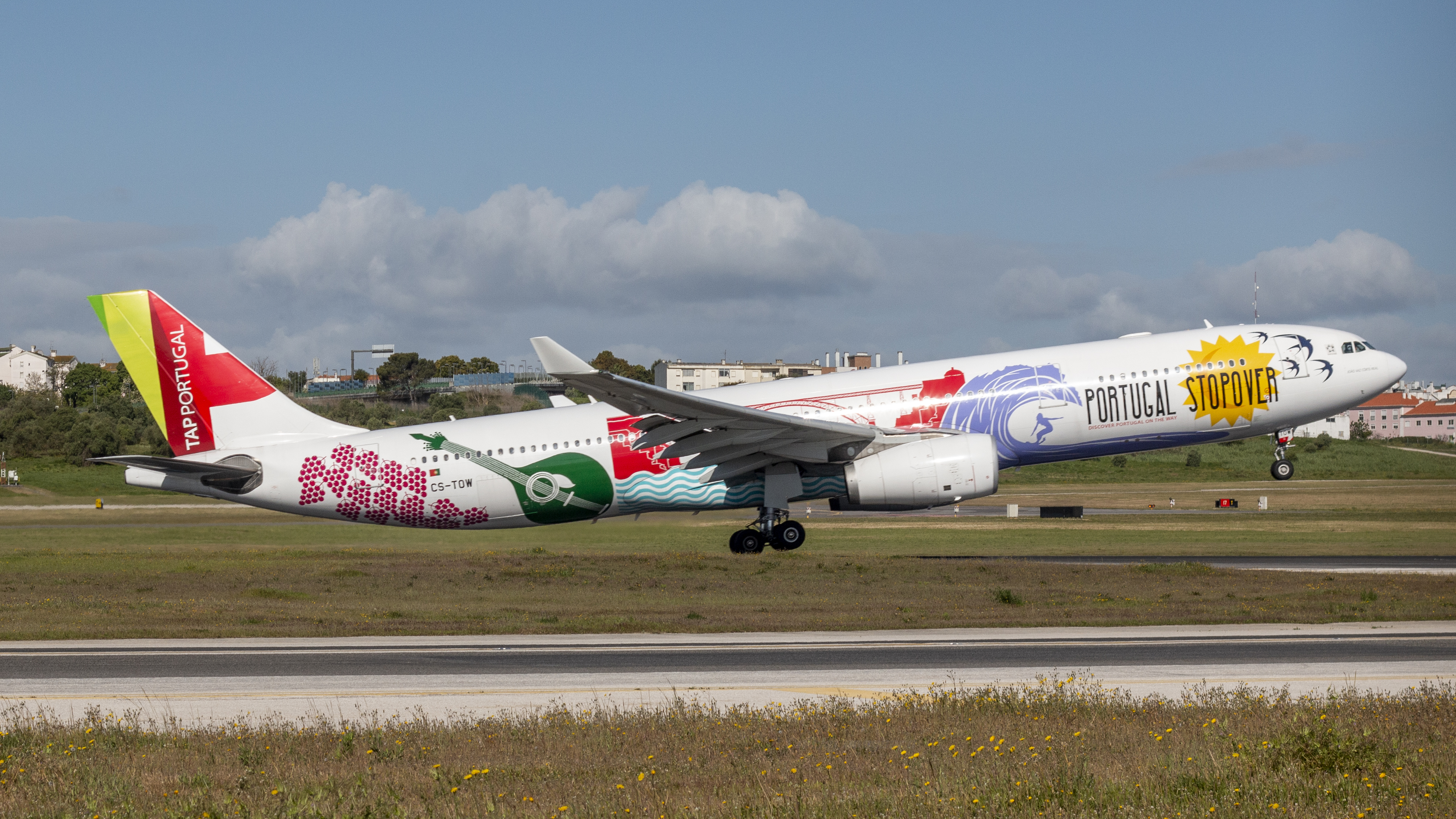 Lisbon, Portugal